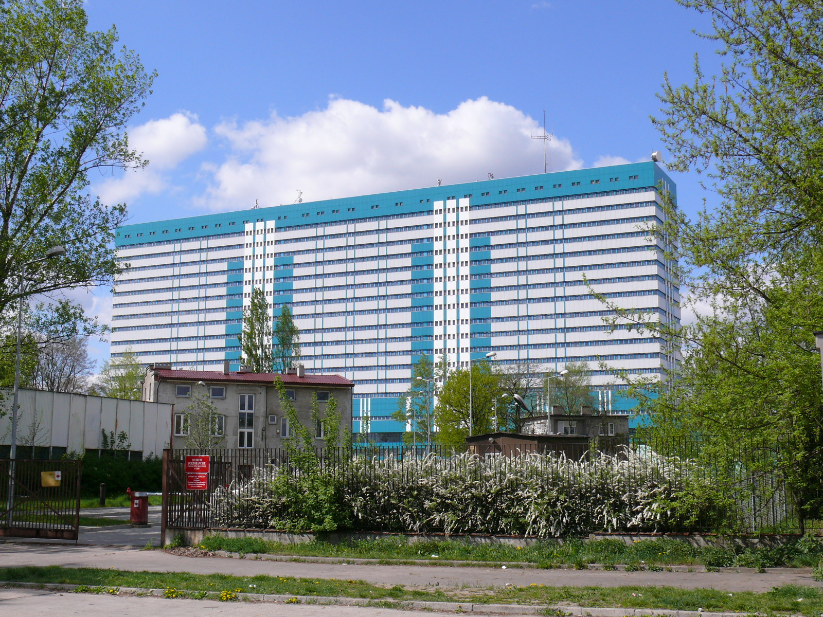 Centralny Szpital Kliniczny Uniwersytetu Medycznego w Łodzi